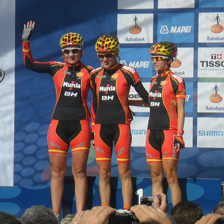 Ploegenpresentatie Spanje voor de start van het Wereldkampioenschap 2012 in Valkenburg, Nederland.